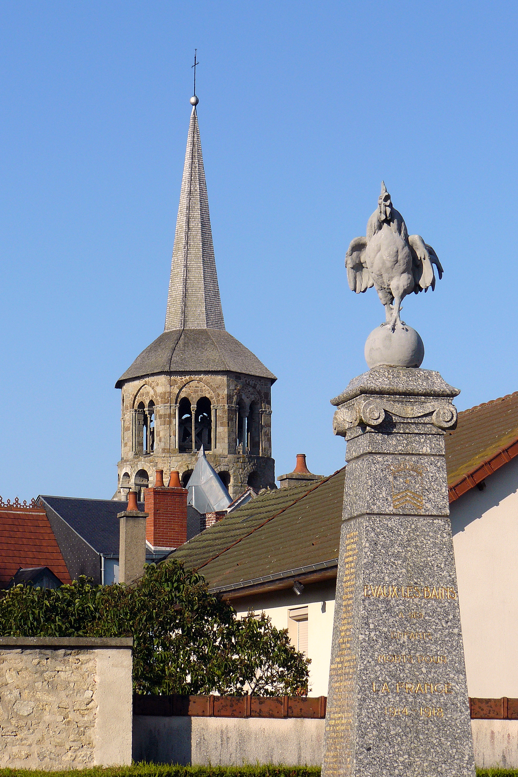 Évaux-les-Bains (Creuse, France) : l'église St-Pierre-et-St Paul et le monument aux morts.